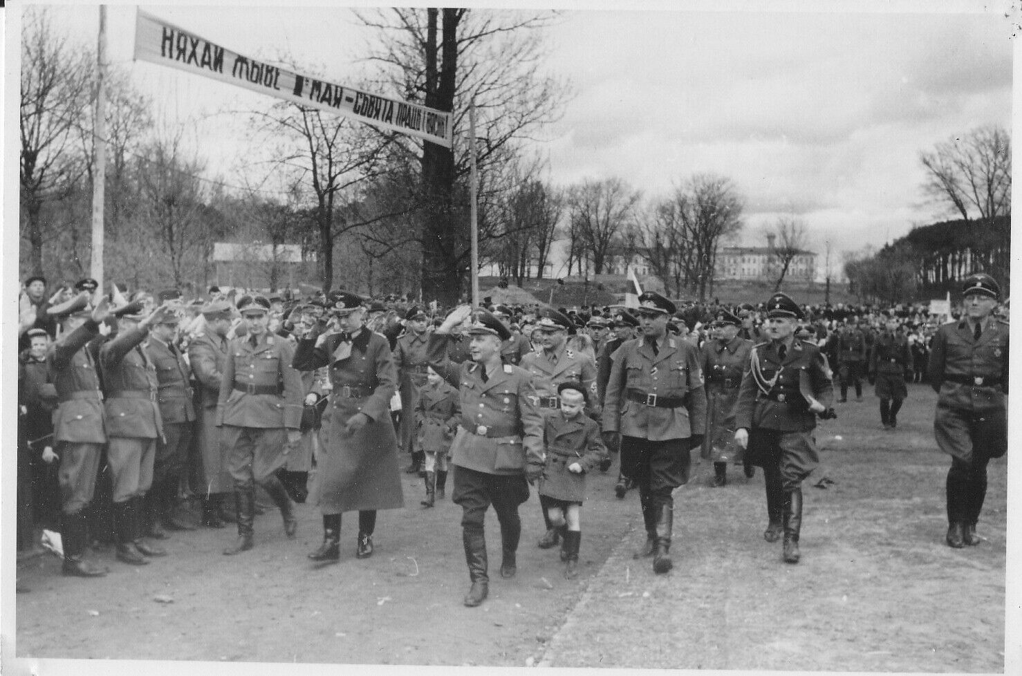 Беларуская (тарашкевіца): Менск (Miensk), Мескі Сад (Mieski Sad) у бок вуліцы Шпітальнай (vulica Špitalnaja). Трэк, удалечыні Вайсковы шпіталь